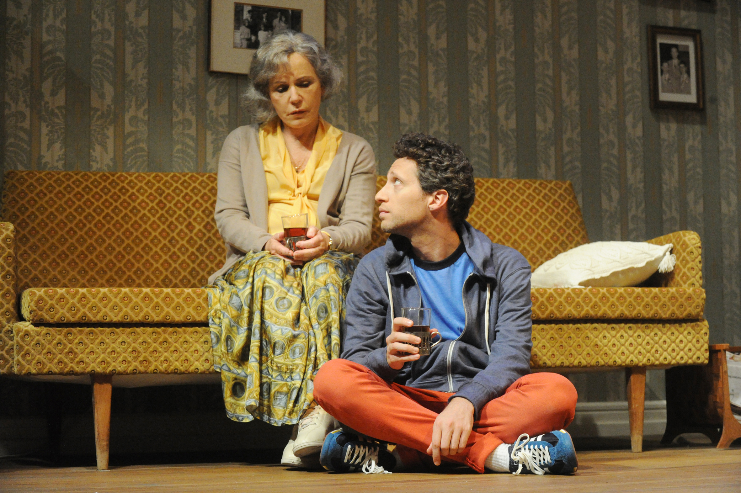 ויטלי פרידלנד ולאורה ריבלין במחזה "סיפור ישן חדש", תיאטרון בית ליסין, מאת: ג`סי אייזנברג, בבימויו של אבישי מילשטיין, 2014